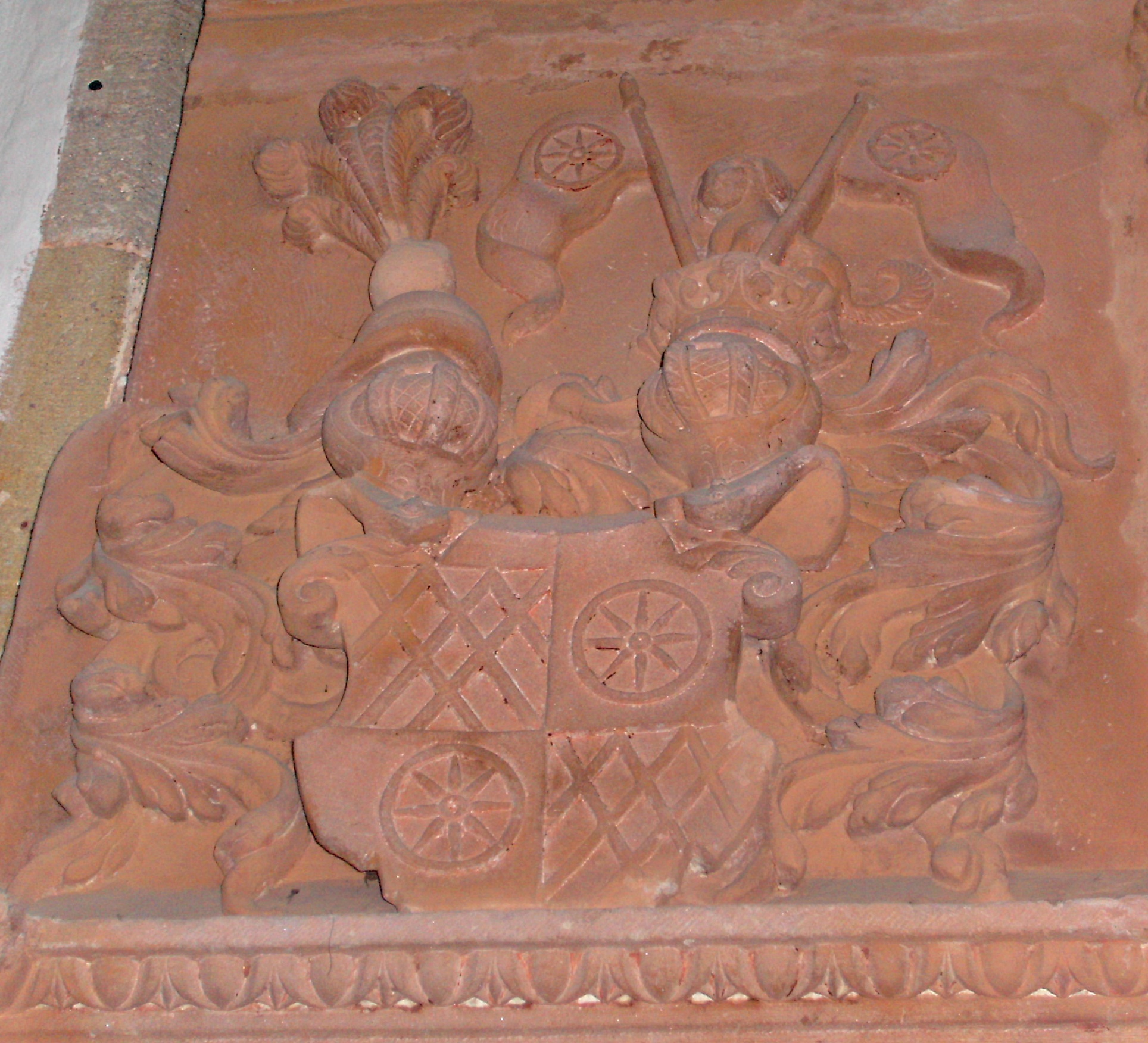 Wappen der Grafen von Daun-Falkenstein, Detail vom Daun-Epitaph, Prot. Kirche Marienthal, Pfalz